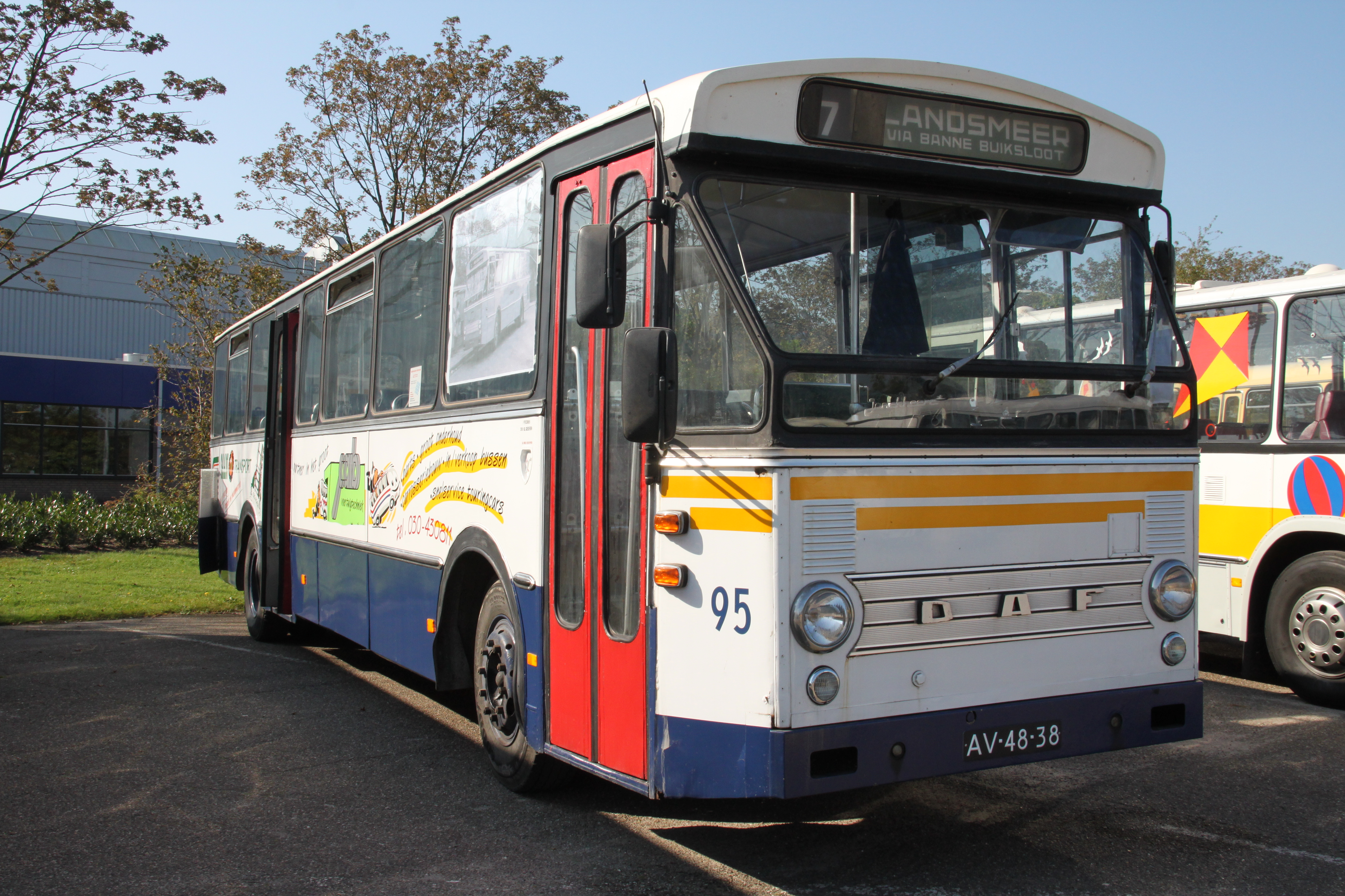 De Enhabo 95, inmiddels van de Stichting BRAM, in de kleuren van GVB Amsterdam tijdens de DAF-Museumdagen in 2011.